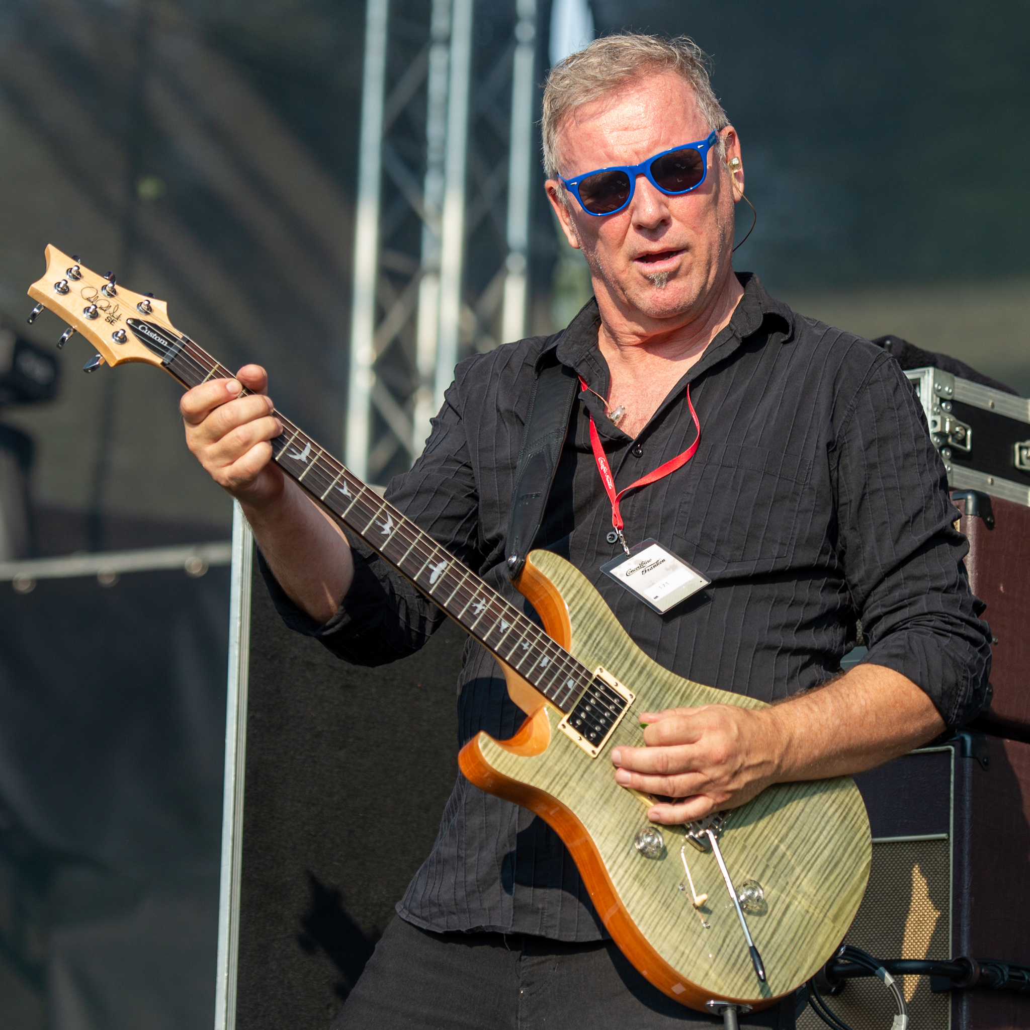 Brombachsee,Concertbüro Franken,Festival,Konzert,Lieder am See,Livekonzert,Livemusik,Musik,Spider Murphy Gang,Willie Duncan